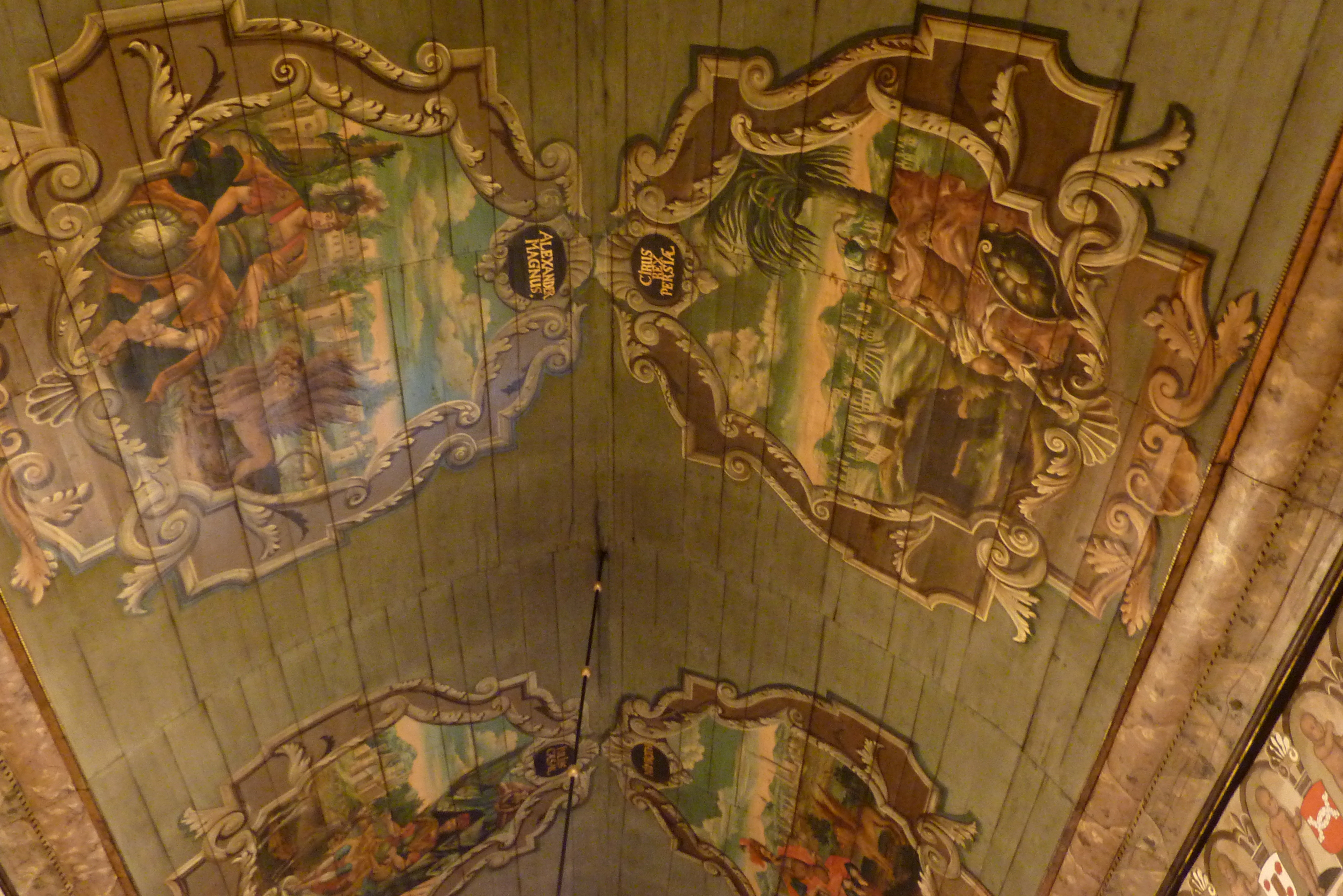 Rathaushalle des Rathauses in Mühlhausen/Thüringen, Brettertonne mit barocken Deckenmalereien in Bandelwerkkartuschen von Johann Herrmann Bauer, um 1747, Darstellung: Kyros II., Nimrod, Alexander der Große, Iulius Cäsar